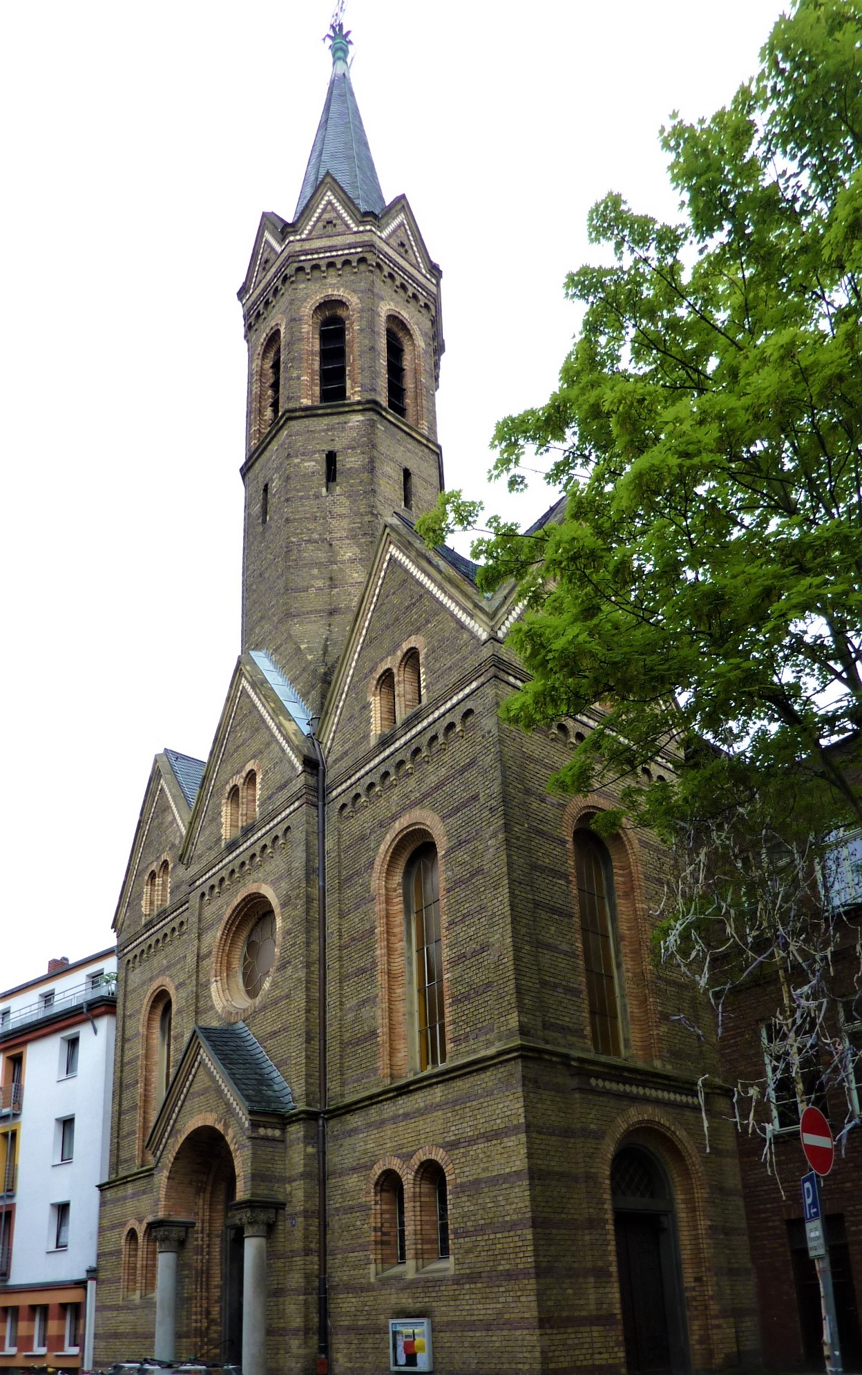 St. Johanneskirche (Köln-Deutz)